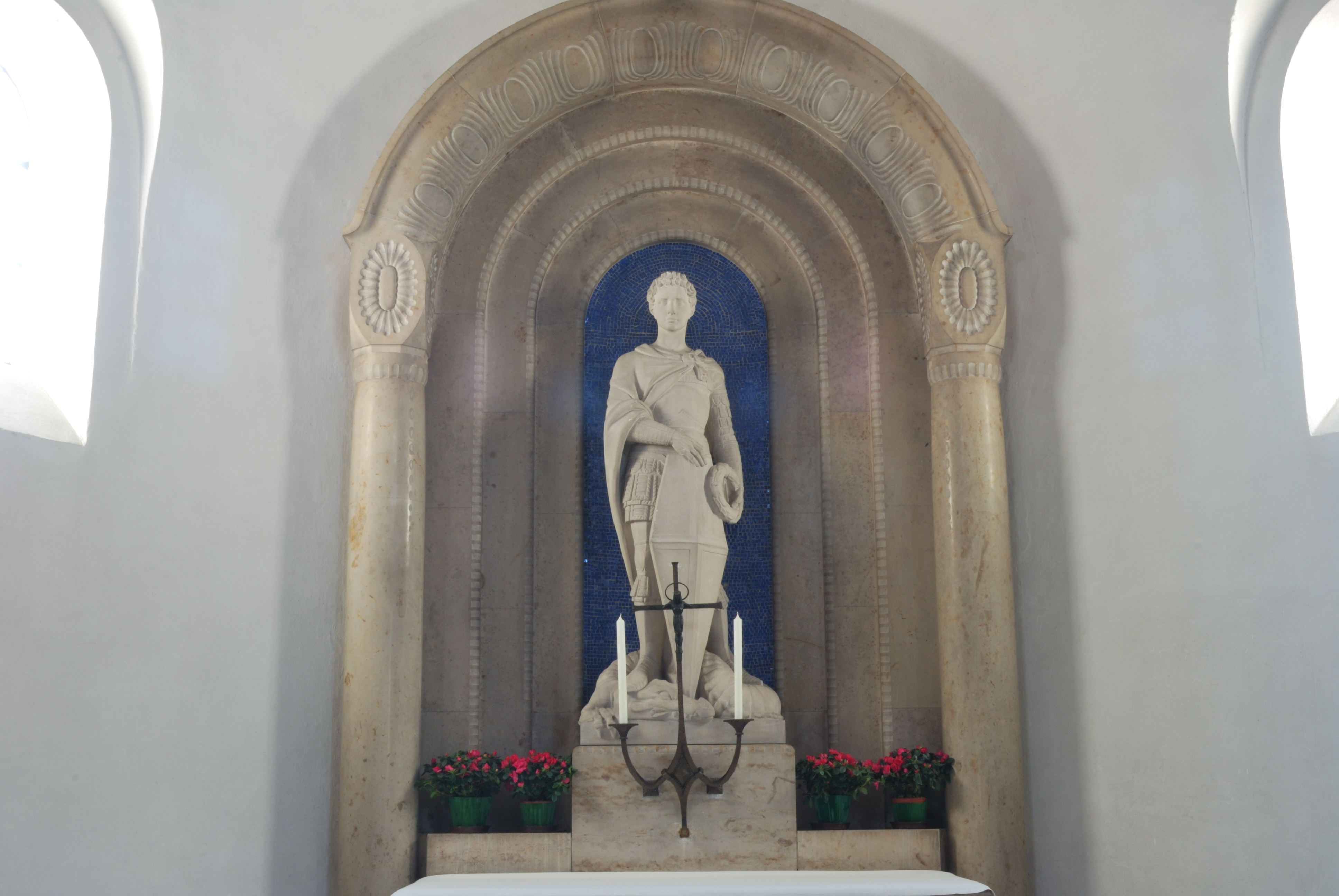 Sandsteinnachbildung des Hl. Georg Donatellos im rechten Seitenschiff